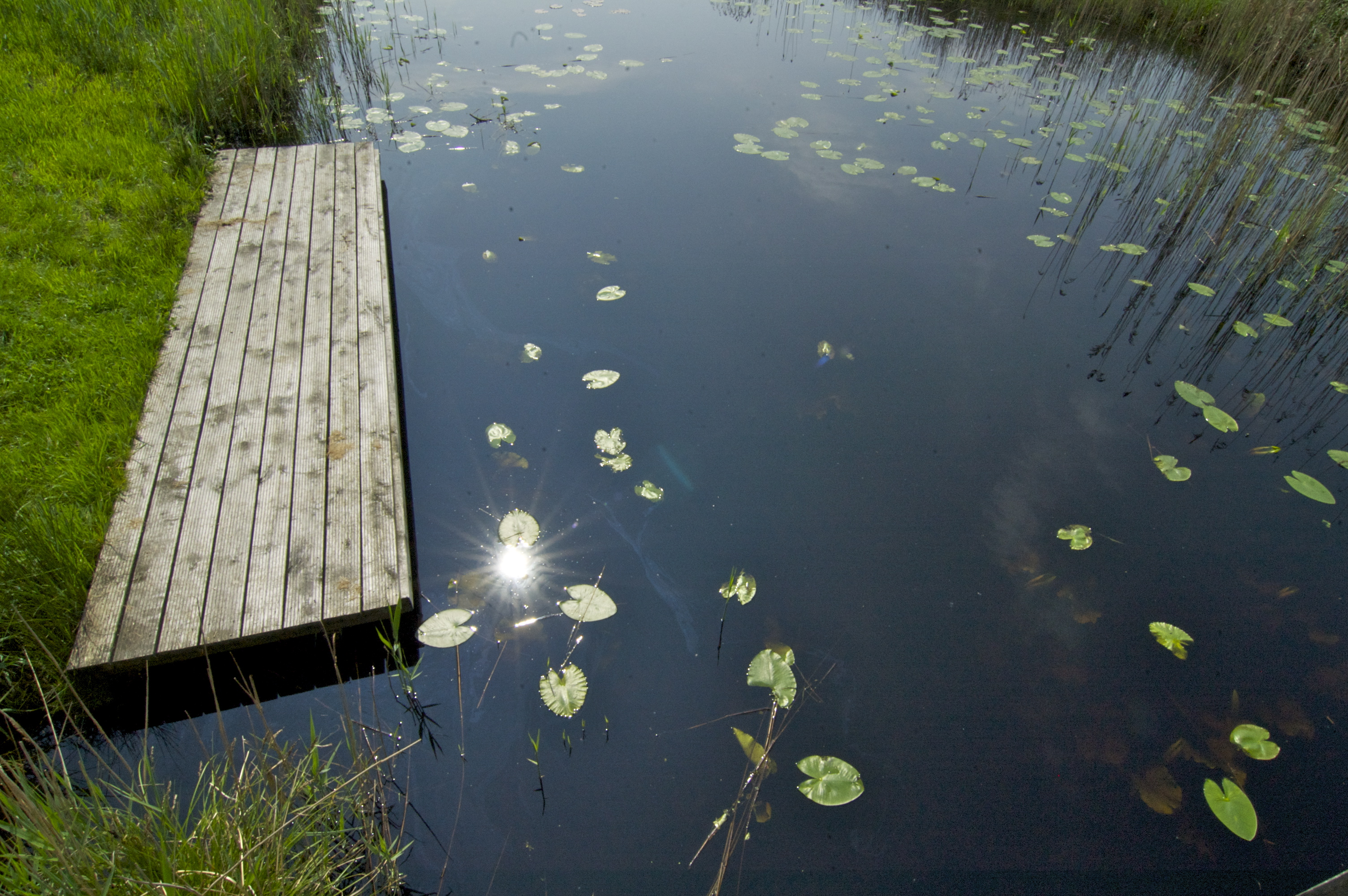 Vlonder This is a photo or sound file made in De Alde Feanen National Park in the Netherlands, with the main subject of the file in the category: landscapes